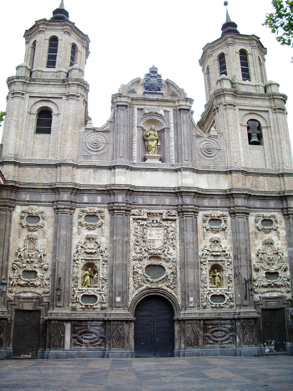 Fachada de la Iglesia de Santa Isabel de Portugal (Zaragoza, España) Año: 1681-1704.